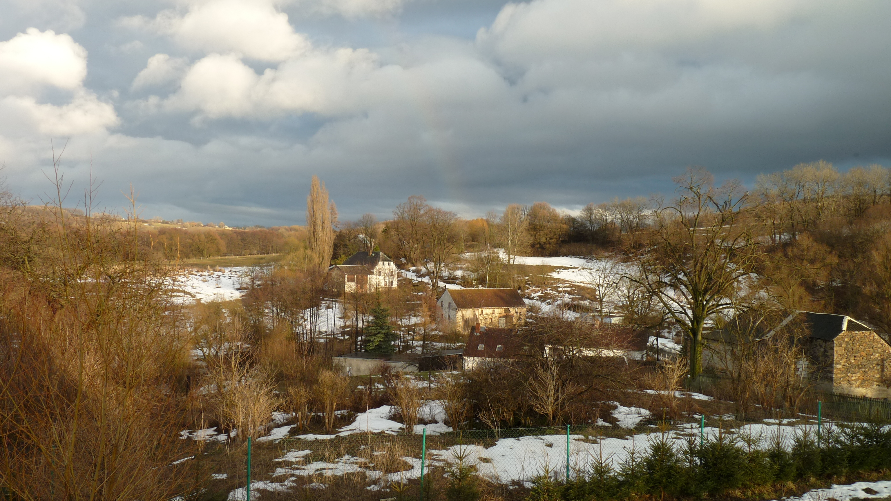 Žďár u Velkého Chvojna - panorama